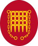 Panama Canal Division